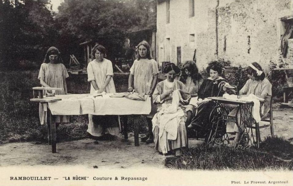 carte postale éditée par l'imprimerie de la Ruche, Rambouillet : les filles apprennent apprennent la couture